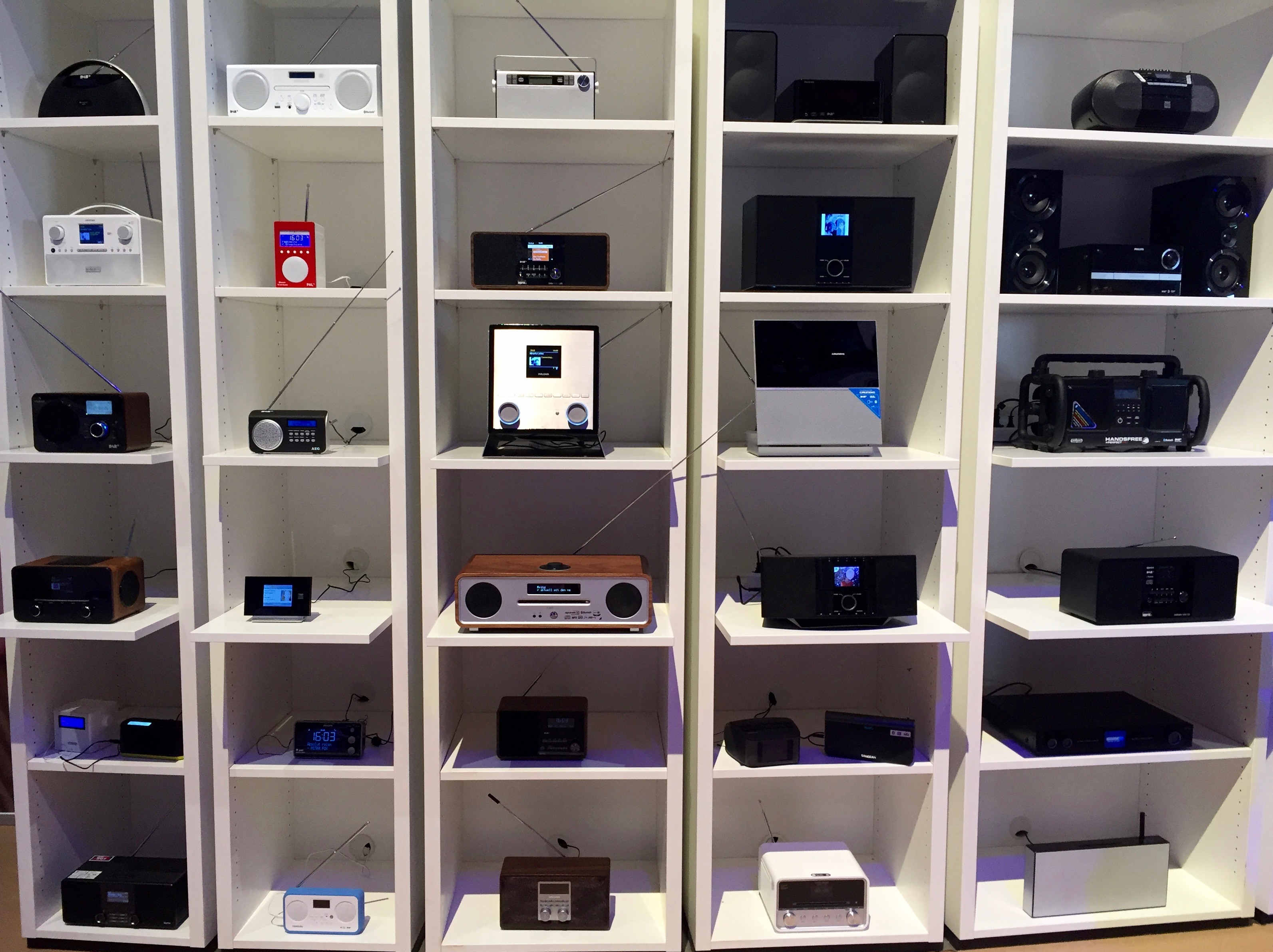 DAB Radioer